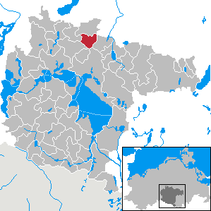 Hinrichshagen in Mecklenburg-Vorpommern - District Müritz